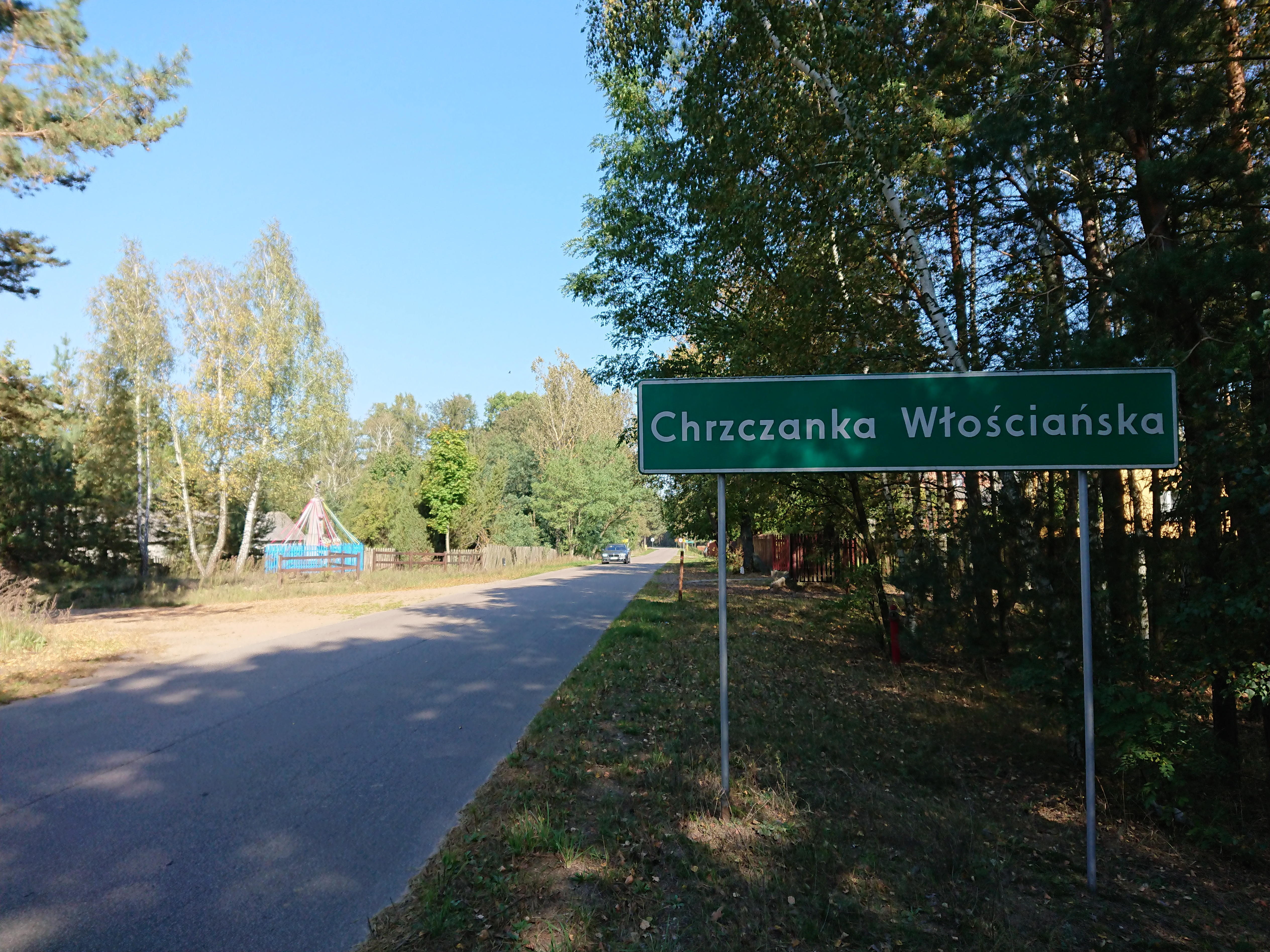 Wjazd do Chrzczanki Włościańskiej